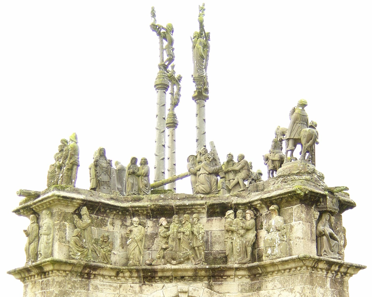 calvaire de Pleyben face nord